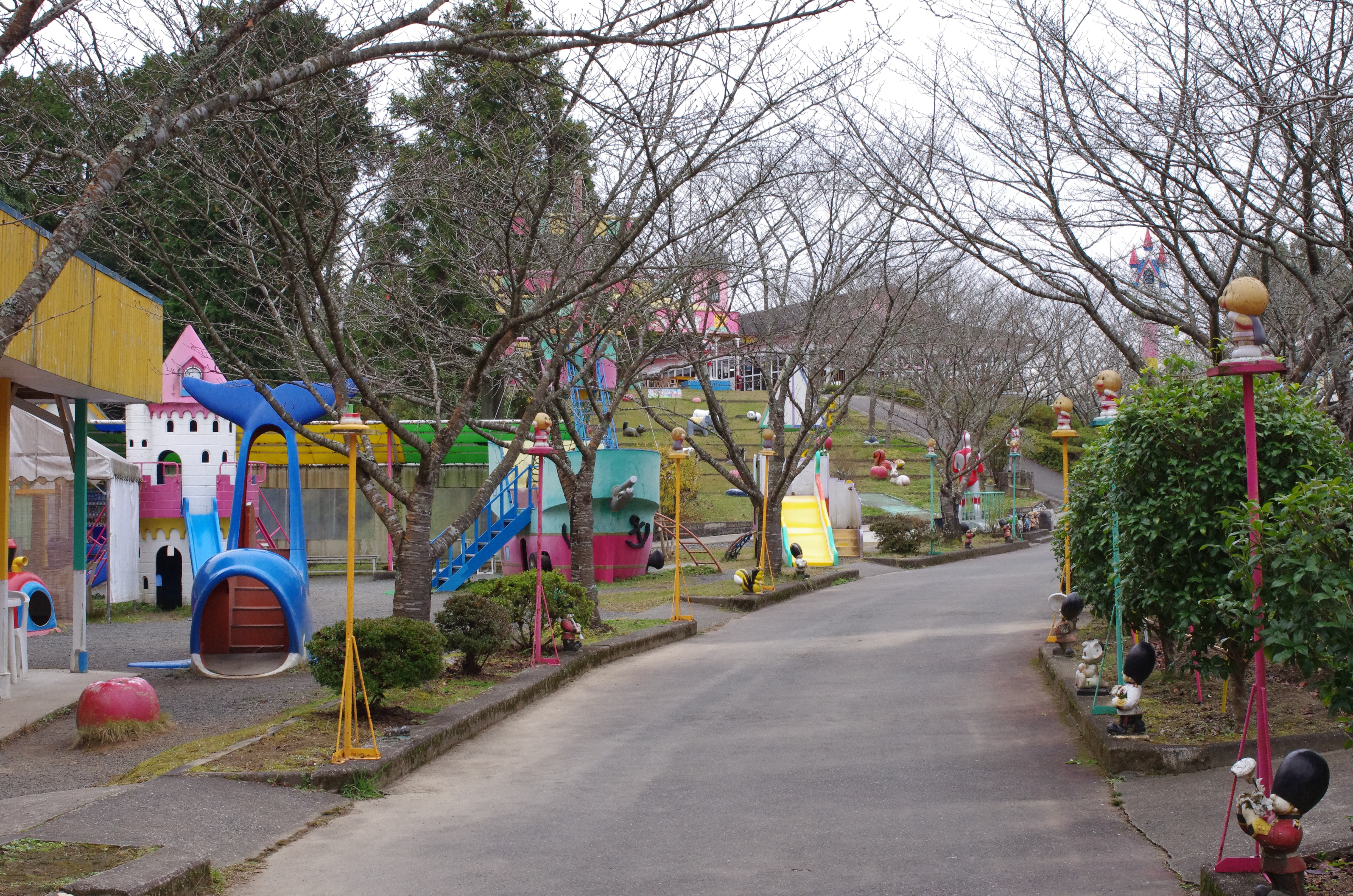 〒843-0232 佐賀県武雄市西川登町大字神六２００４０ 「メルヘン村」